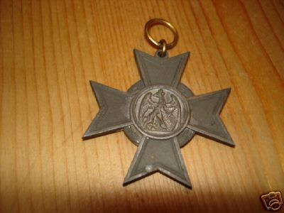 KVK Baden 1914